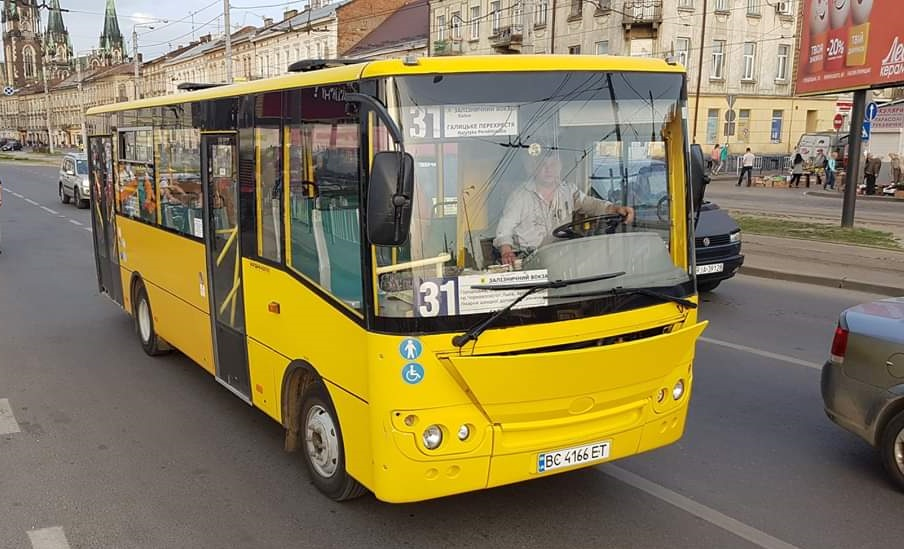 Богдан А22112 маршруту №31 у Львові біля приміського вокзалу (2019)